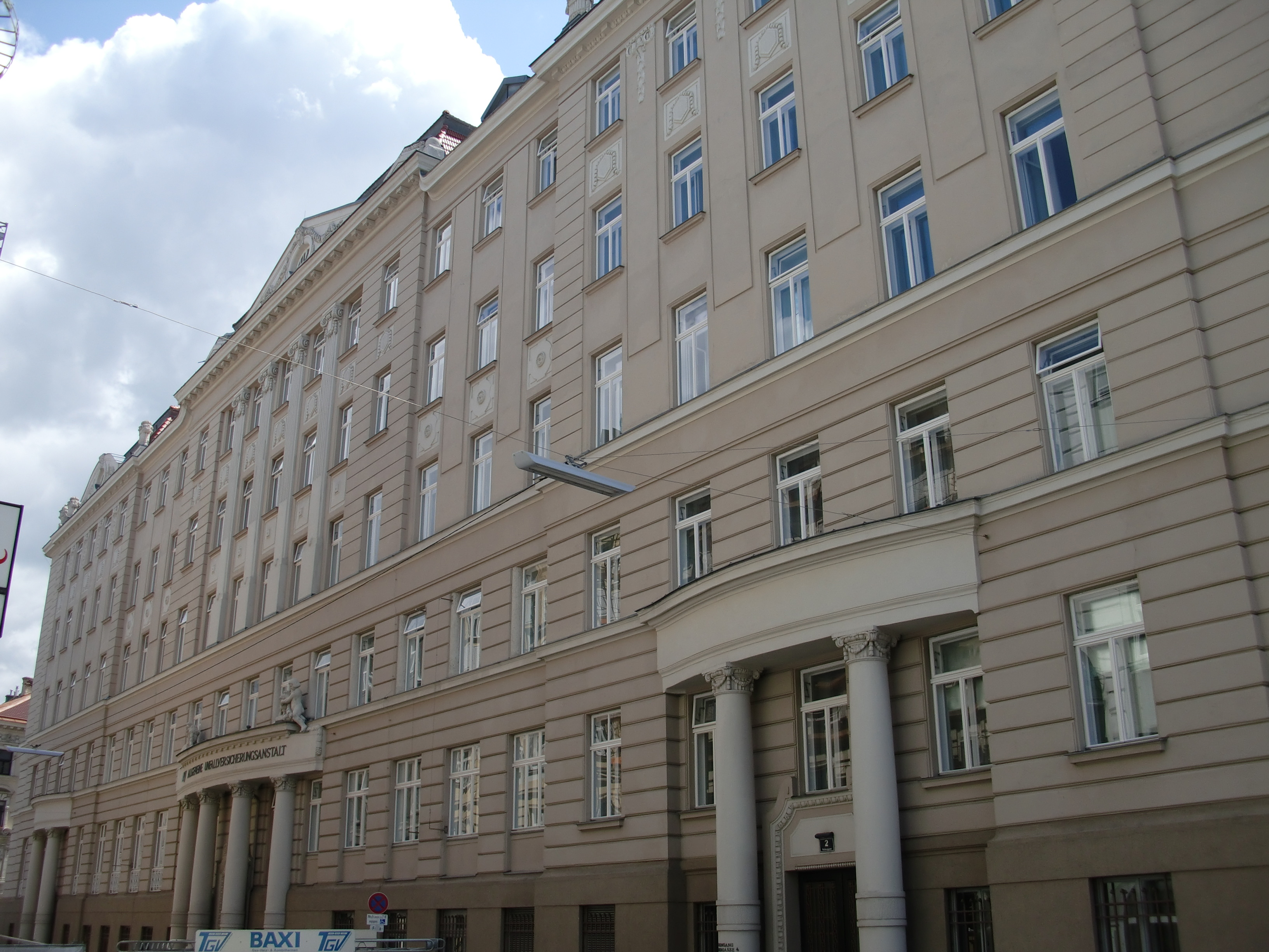 Wien, Direktionsgebäude der Allgemeinen Unfallversicherungsanstalt (AUVA), Gebäudefront 20, Webergasse 2,4,6